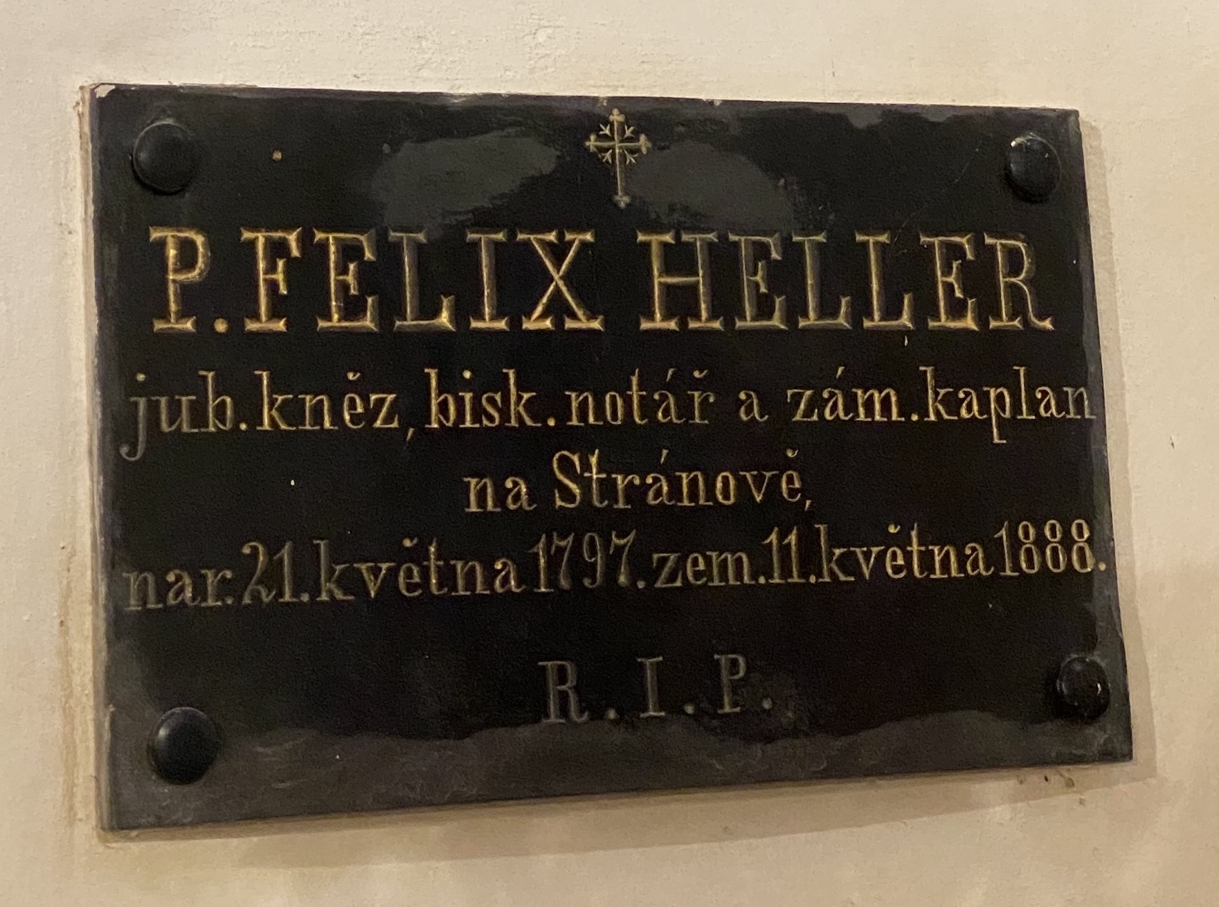 P. Felix Heller, Krnsko - pamětní deska v kostele sv. Jiří